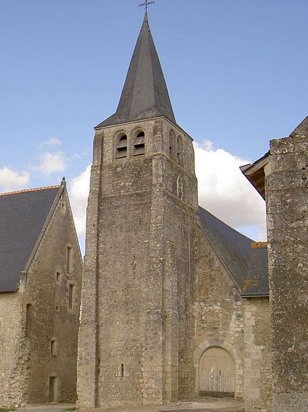 Clocher et portail de l'église Saint-Sulpice.